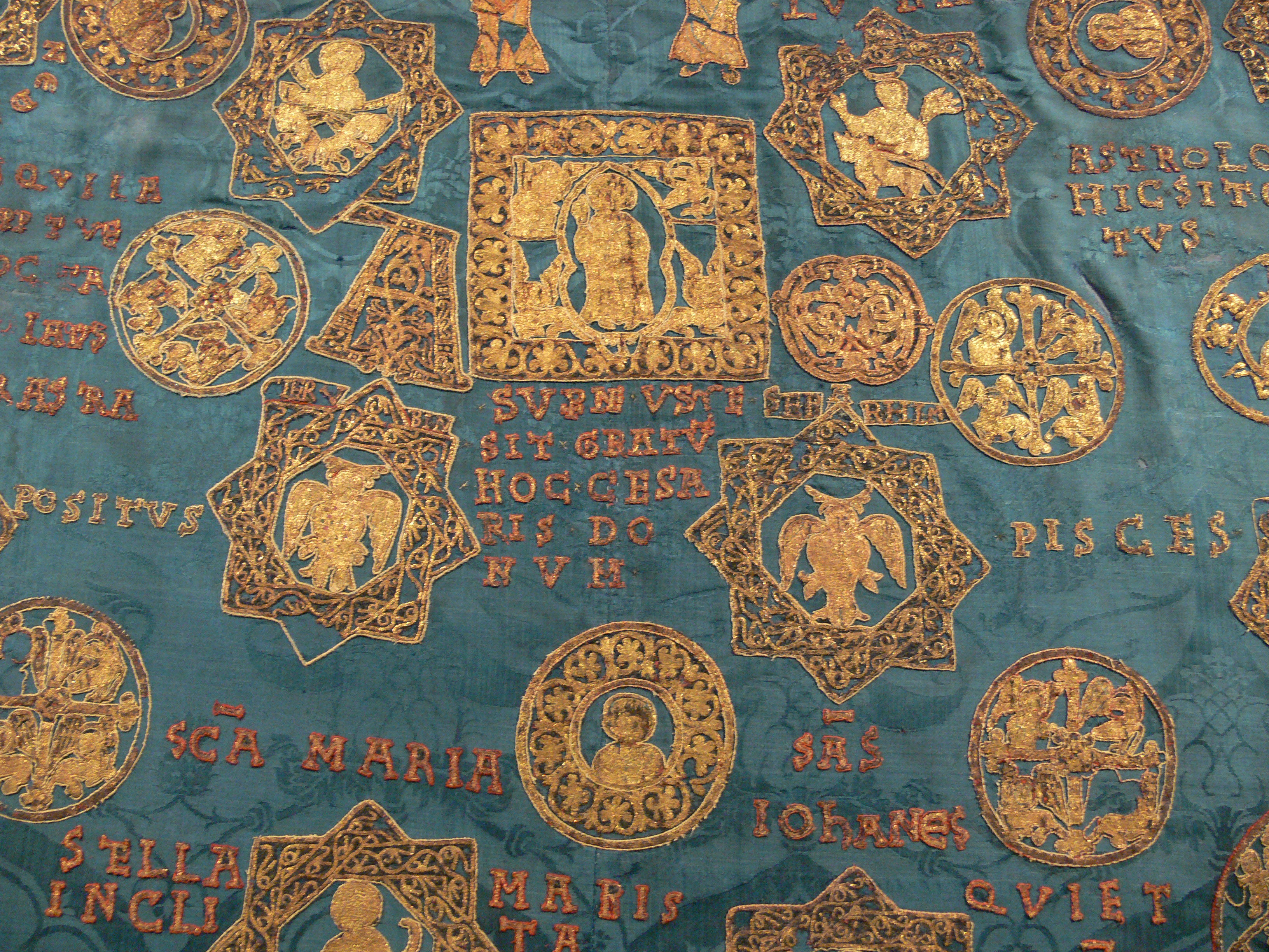 Sternenmantel Kaiser Heinrichs II. Stickereien: Regensburg, um 1018–1024, Trägerstoff: Italien, um 1453. Diözesanmuseum Bamberg (2728/3–6)